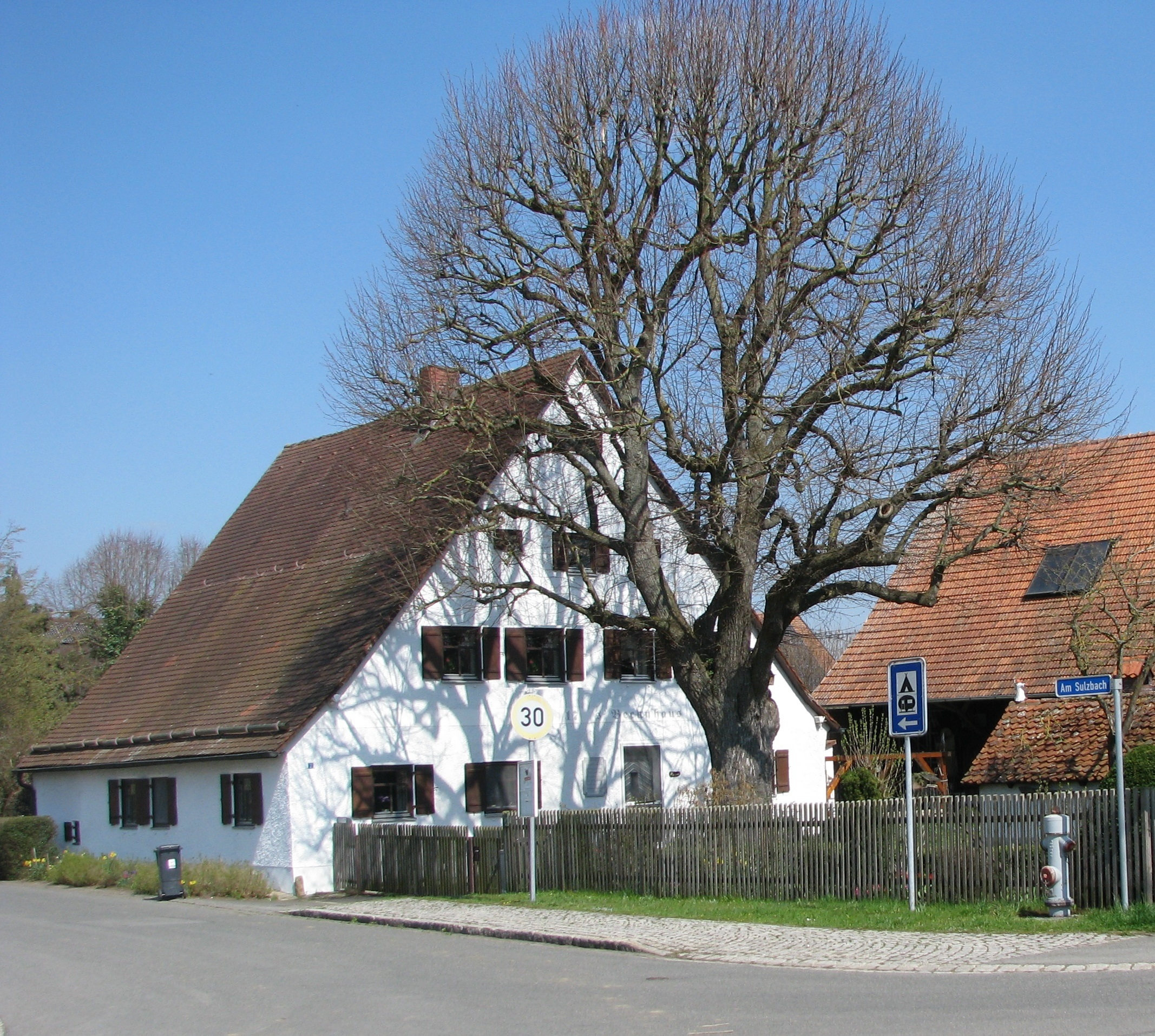 Rocksdorf, Ortsteil von Mühlhausen im Landkreis Neumarkt in der Oberpfalz, Baudenkmal Wohnstallhaus Am Sulzbach 2